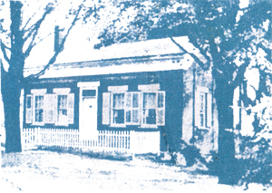 粵語: 湯馬士．艾爾巴．愛迪生出世時嘅屋企外貌，喺美國俄亥俄州嘅米蘭鎮。（圖像來自二十幾年前一本台灣名人傳記系列，書已經殘哂，唔知邊間出版社）